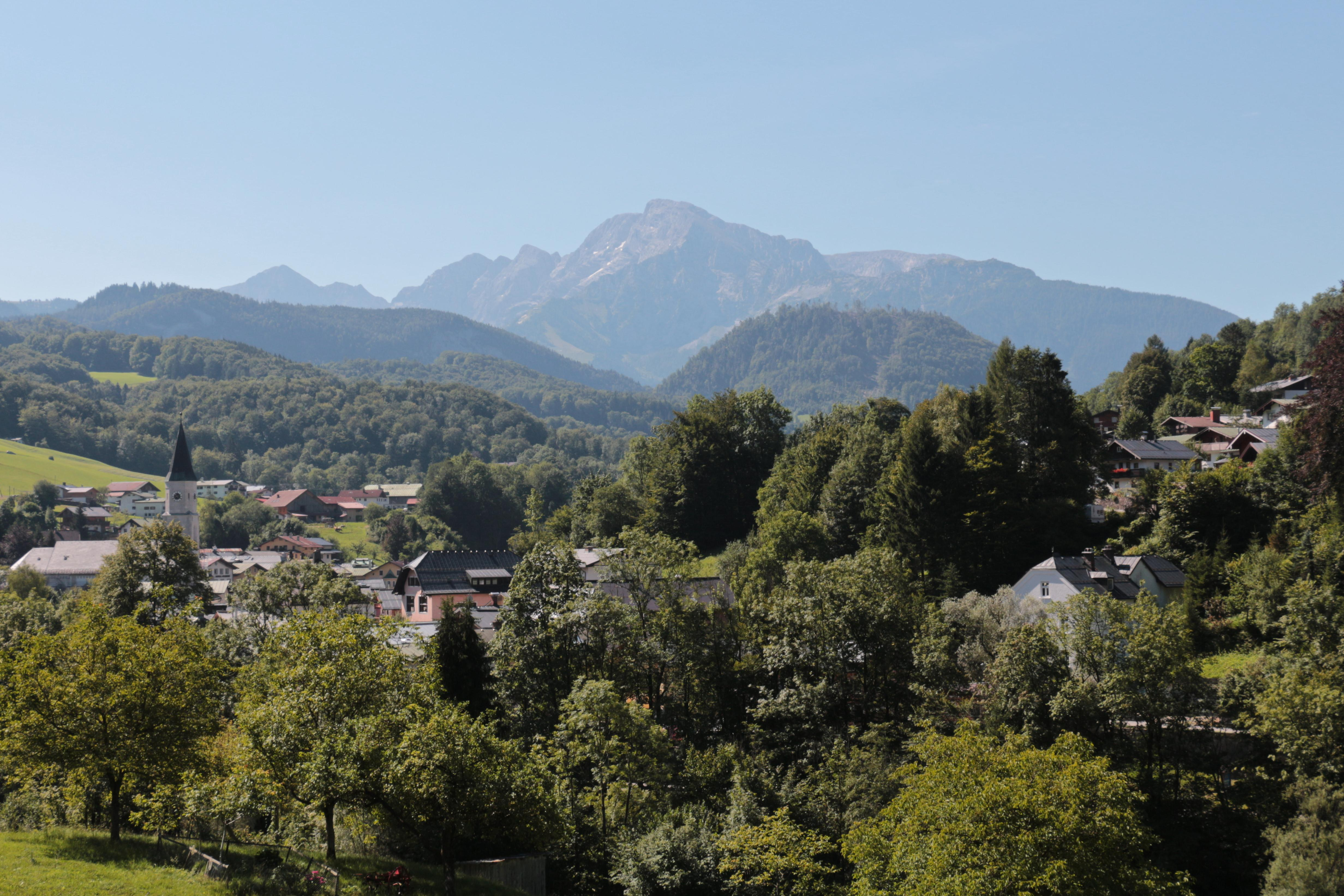 Blick auf Marktschellenberg von Norden